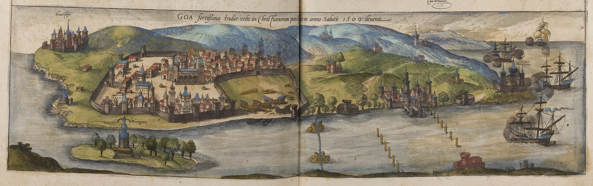 Goa